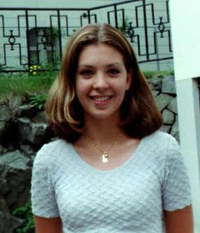 Standing outdoors